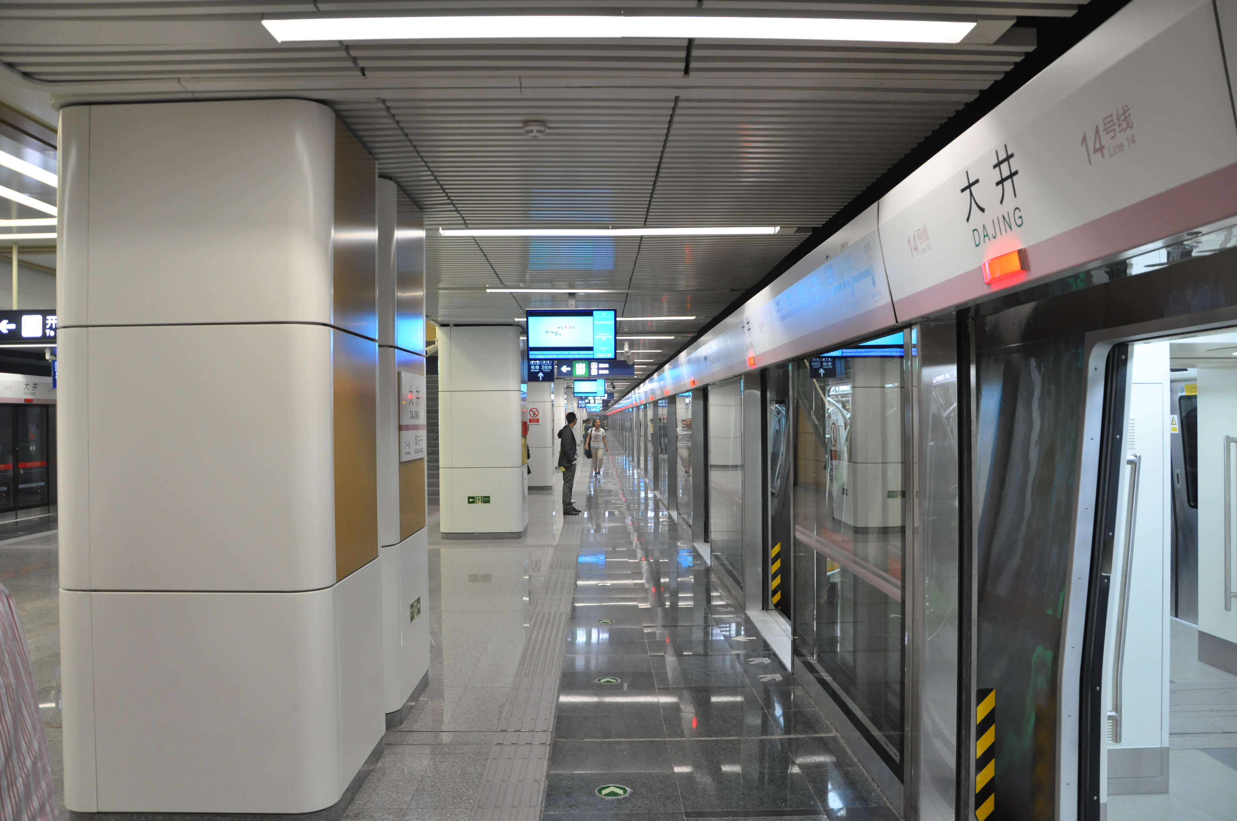 北京地铁14号线大井站站台